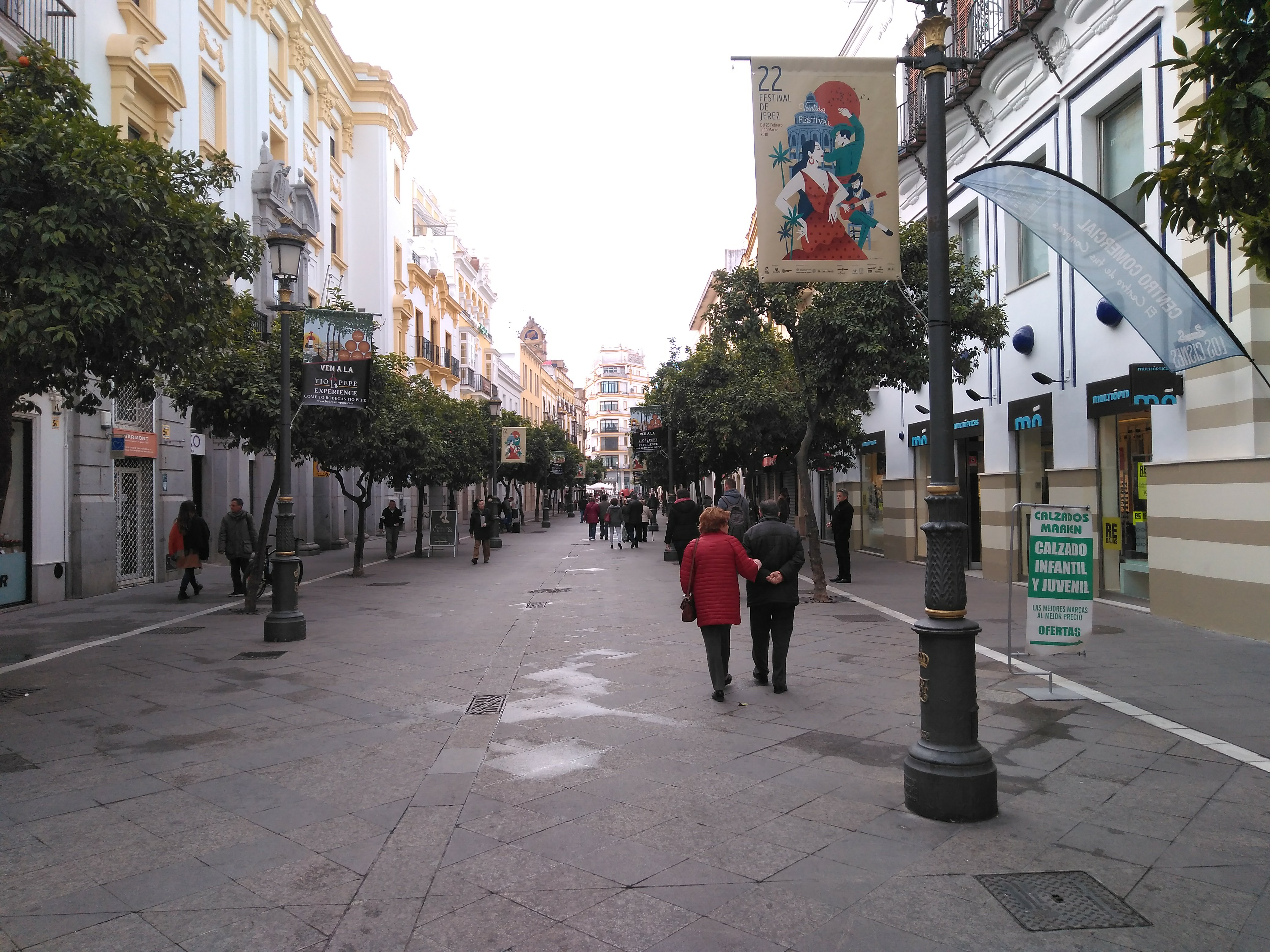 calle Larga de Jerez engalanada con banderolas del Festival Flamenco de Jerez (España)